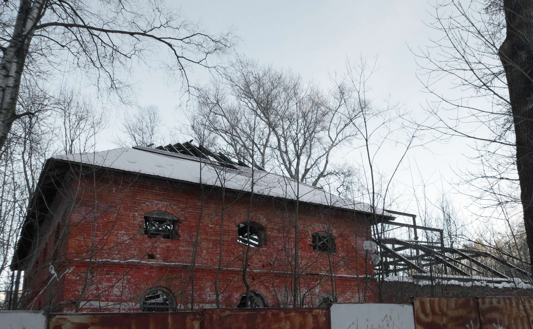 Всеволожск. Бывшая мыза Рябово. Сыроварня барона Фридрикса, 1774 года постройки.